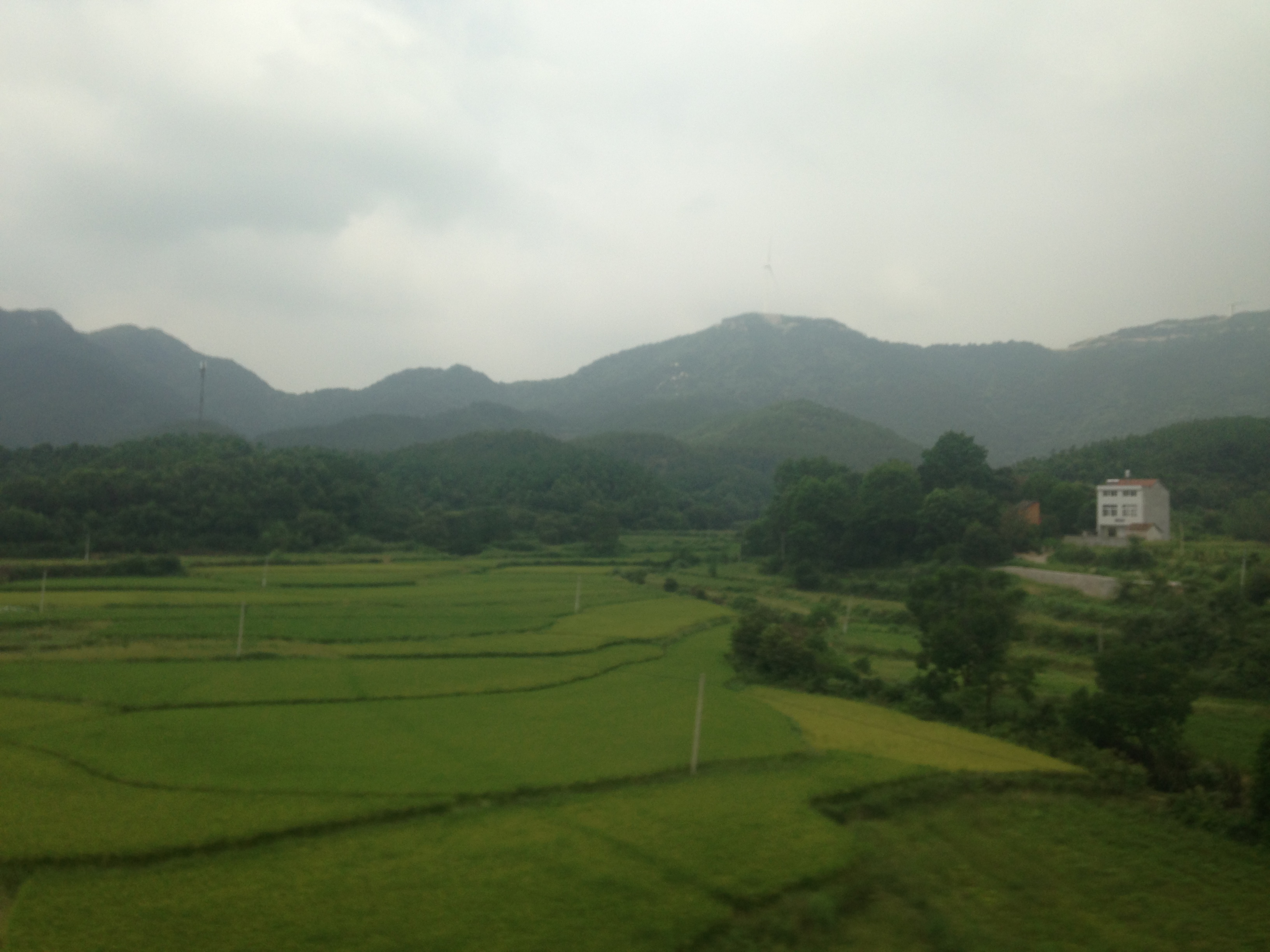 石武旅客専用線の列車内より望む孝感市大悟県夏店鎮付近の景色